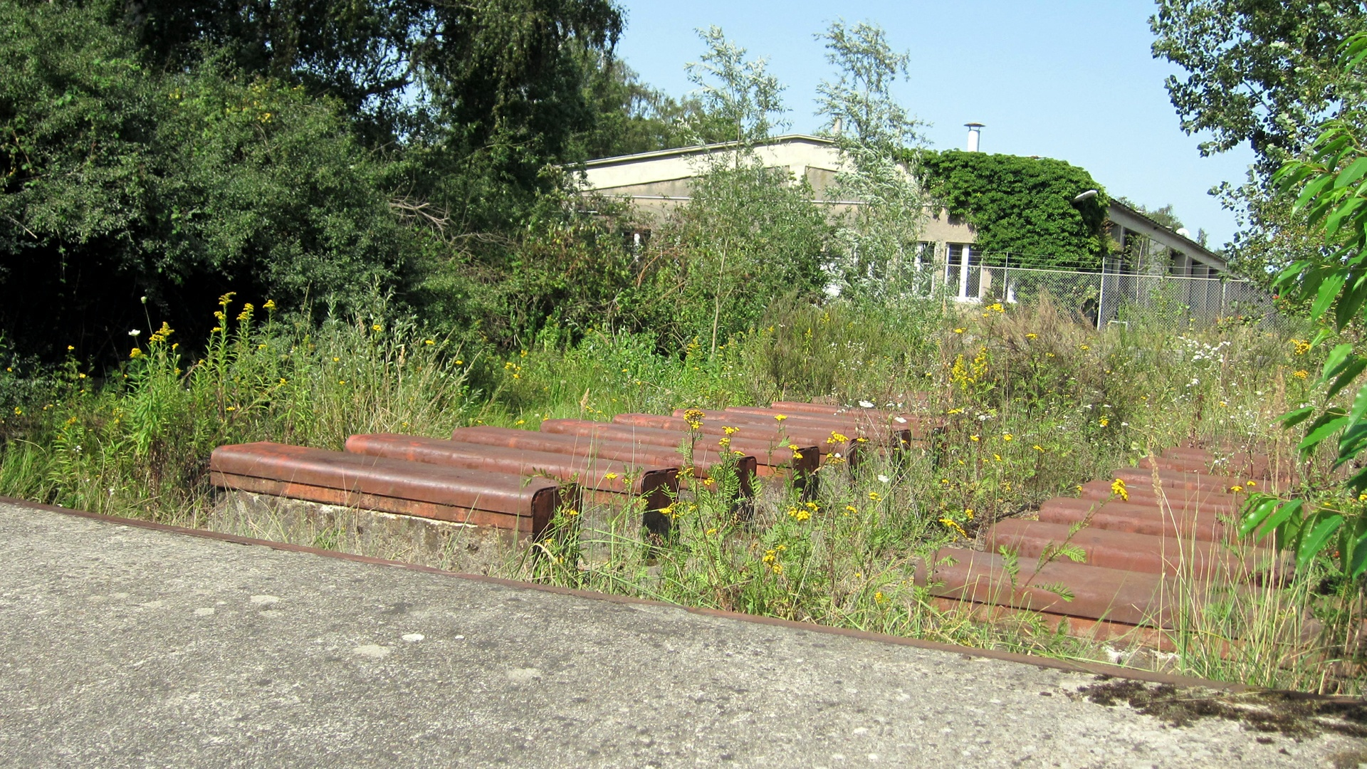 Ehemalige Panzerwaschanlage an der Wahner Heide in Troisdorf, ehemaliges Camp Altenrath (früheres belgisches Camp Major Legrand)